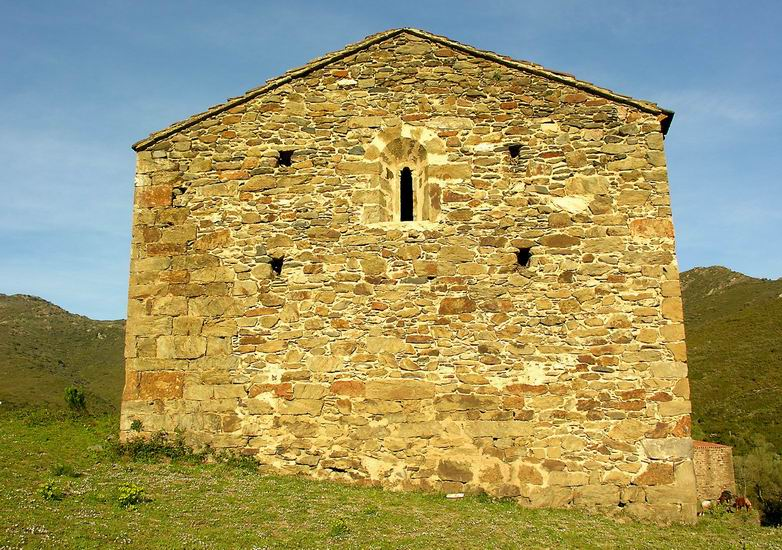 Façana de ponent de Santa Maria de Colera, al municipi de Rabós. Forma part del conjunt monàstic de Sant Quirze de Colera